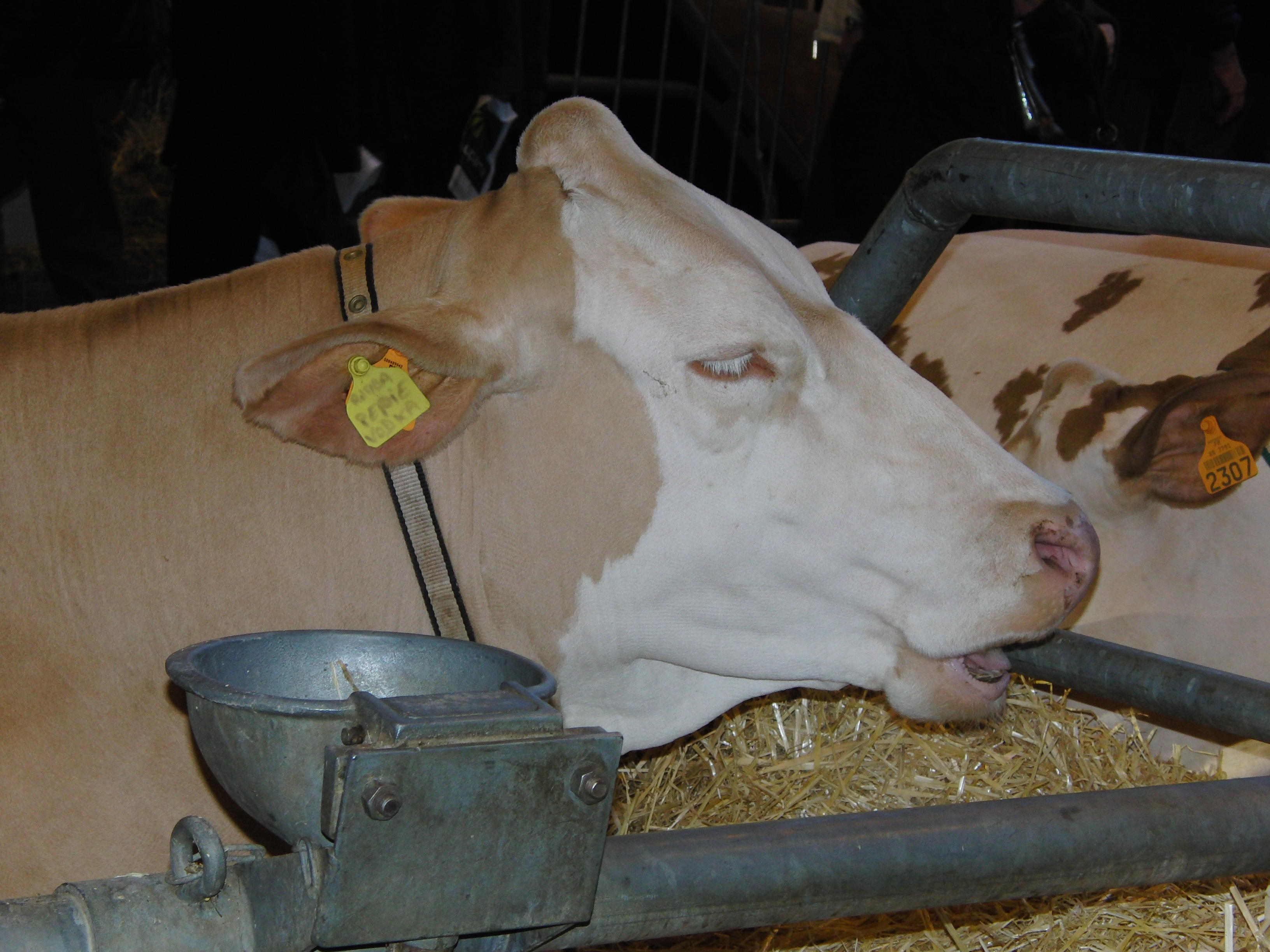 Vache Simmental - Salon de l'Agriculture 2010